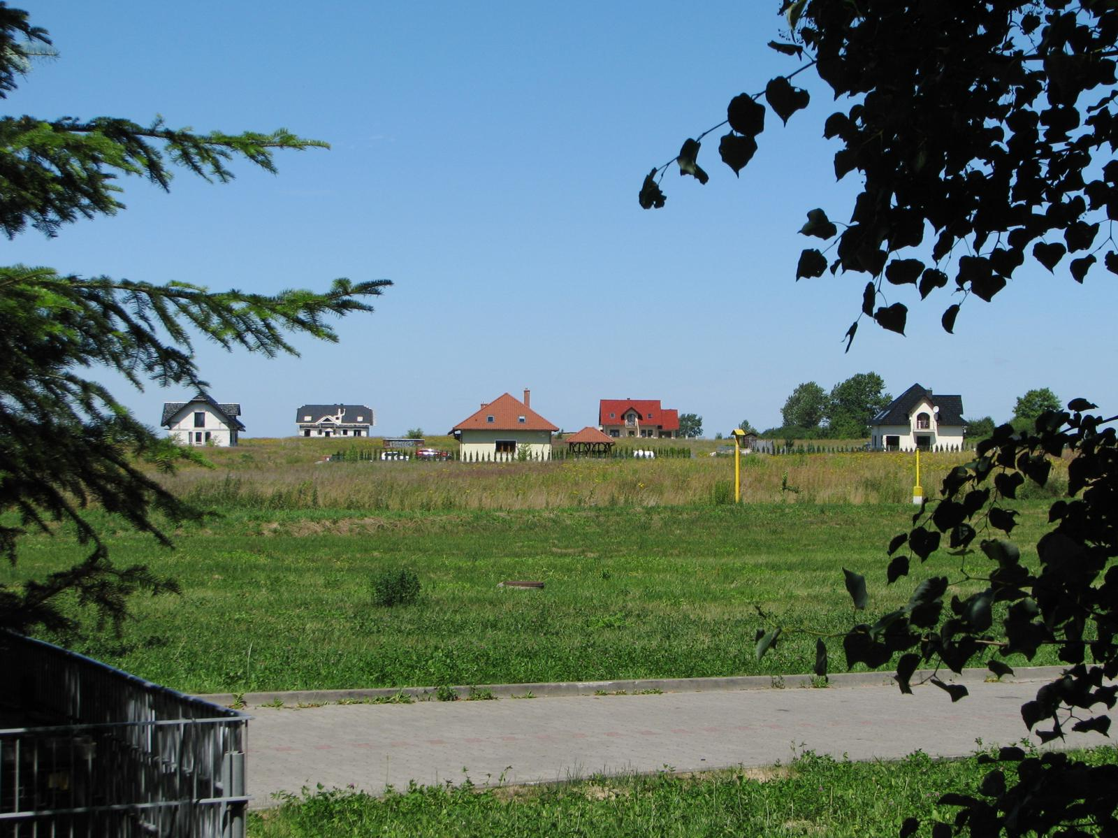 Wojcieszyce. Pierwsze domy na Osiedlu Południowym